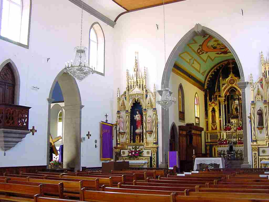 Igreja da Agualva, vista lateral da nave central e dependências, Agualva, ilha Terceira, Açores, Portugal